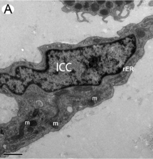 Figura 6. Colon humano adulto normal. TEM: características ultraestructurales típicas observadas. La ICC normal tiene un aspecto triangular, núcleo ovalado con heterocromatina condensada distribuida en la periferia, abundantes mitocondrias (m) y retículo endoplásmico rugoso (rER). Barra=